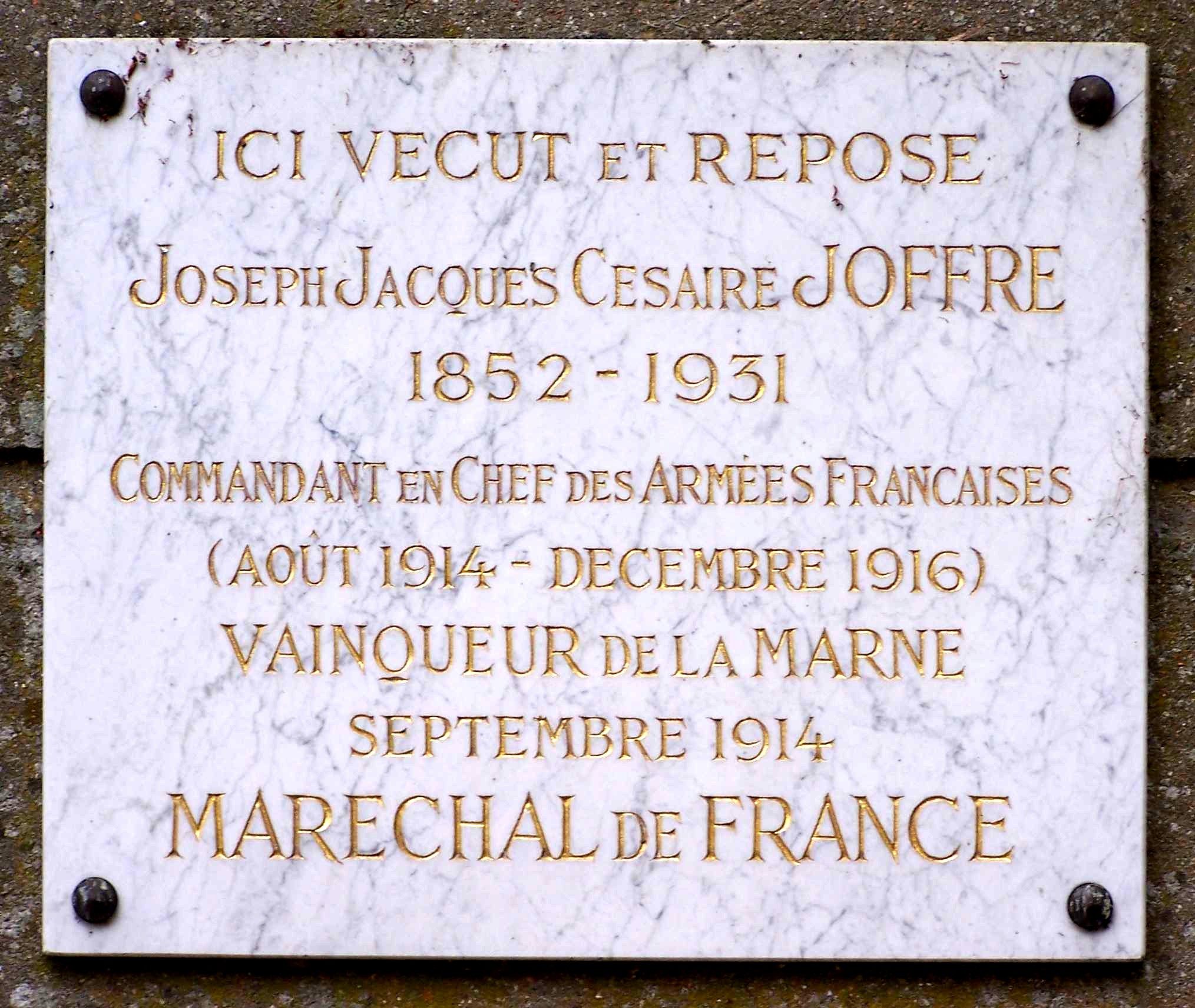 Gedenktafel Marschall Joffre in Louveciennes (Yvelines, Frankreich), 25 rue du Maréchal Joffre, Ecke chemin des Gressets. Übersetzung der Inschrift:Hier lebte und liegt begraben Joseph Jacques Césaire Joffre 1852-1931 Oberbefehlshaber der französischen Armee (August 1914 - Dezember 1916) Sieger der Marneschlacht September 1914 Marschall von Frankreich